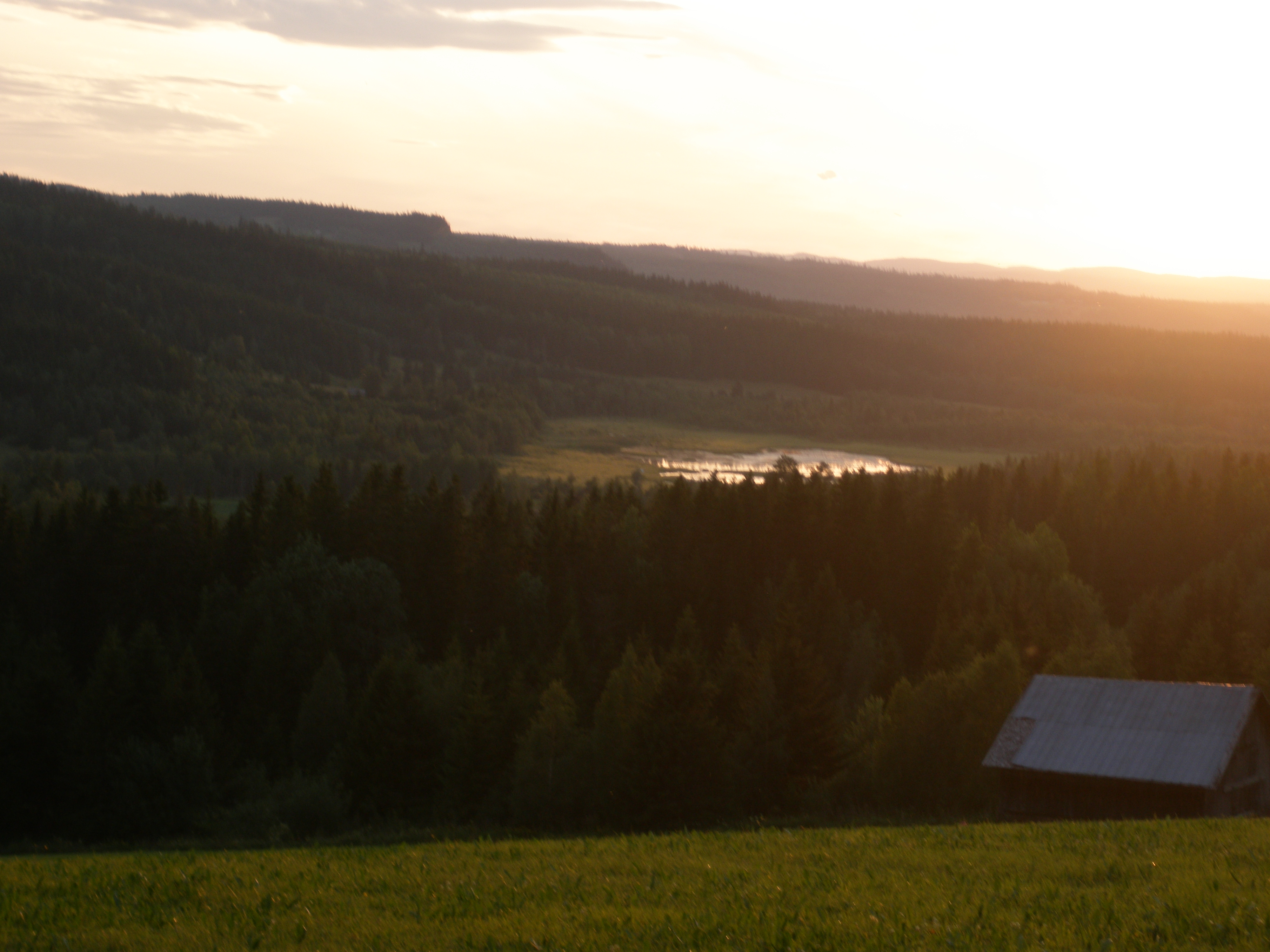 Trolltjärnen, Åflo, Offerdal, Jämtlands län, Sverige